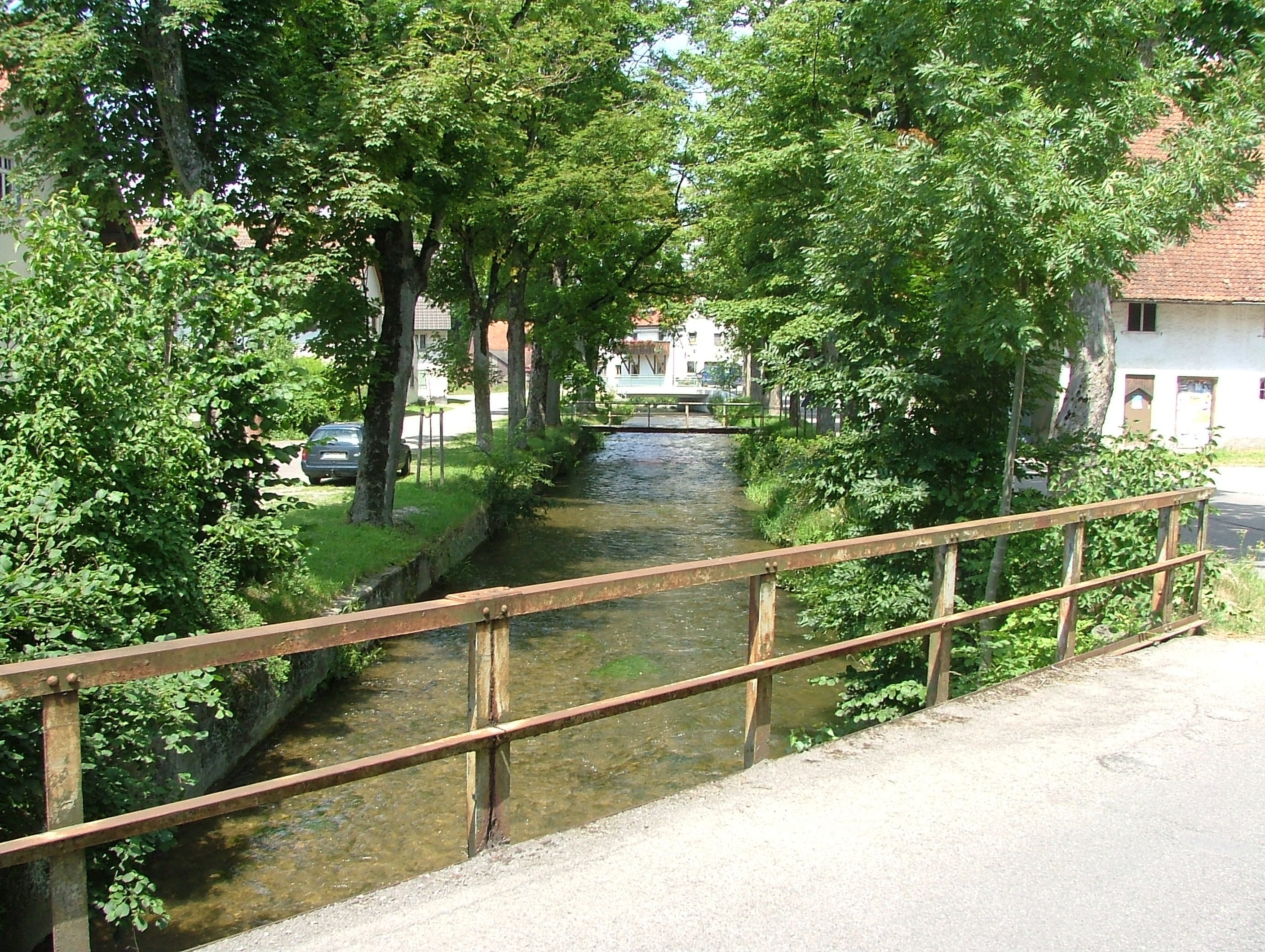 Östliche Günz in Erkheim